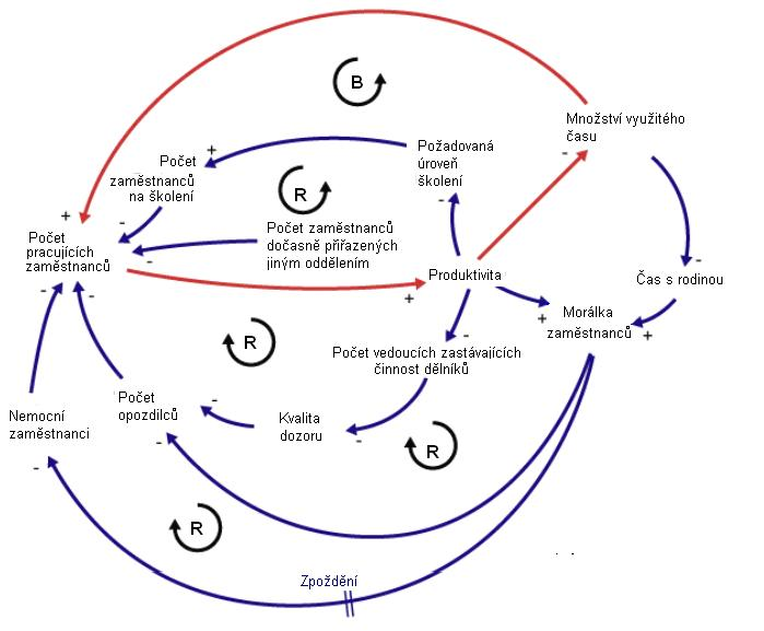 Ukázkový diagram kauzálních smyček